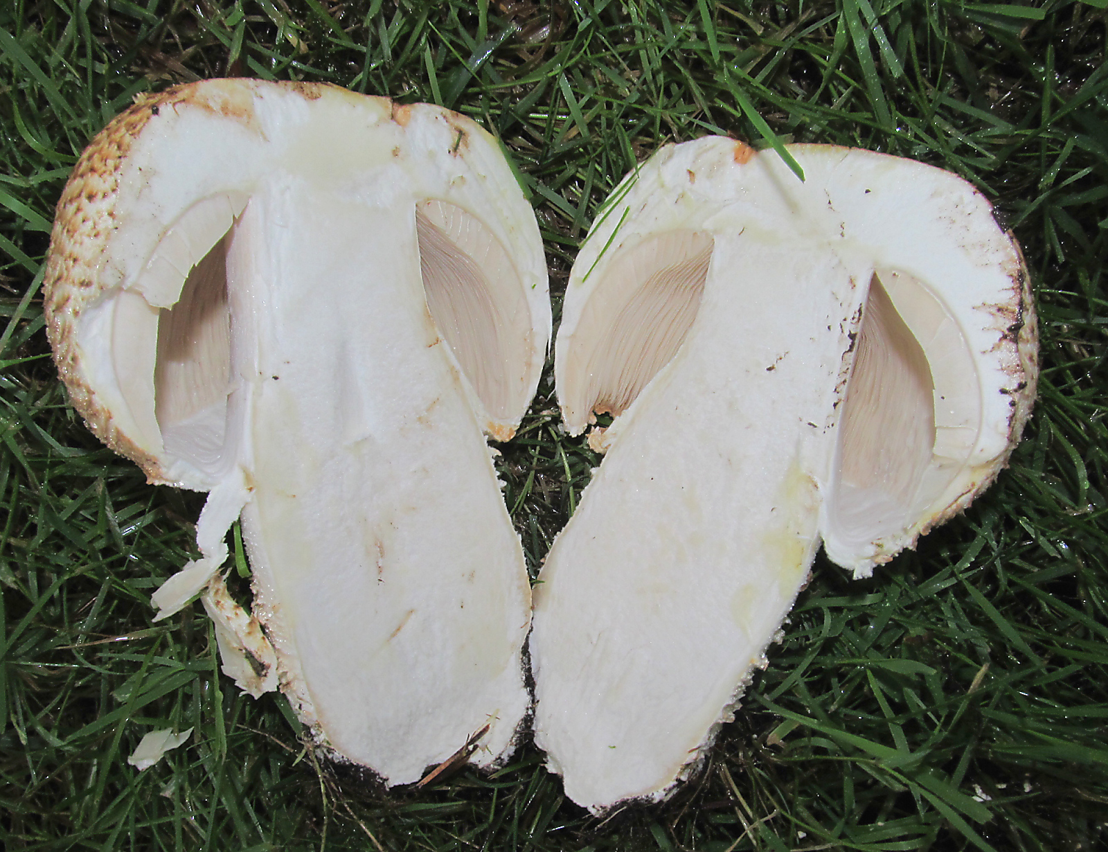 Agaricus augustus Fr.